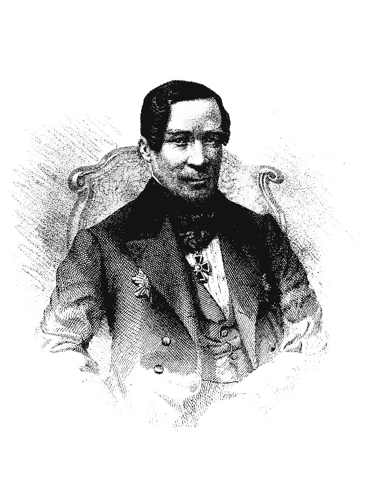 Портрет К. И. Арсеньева